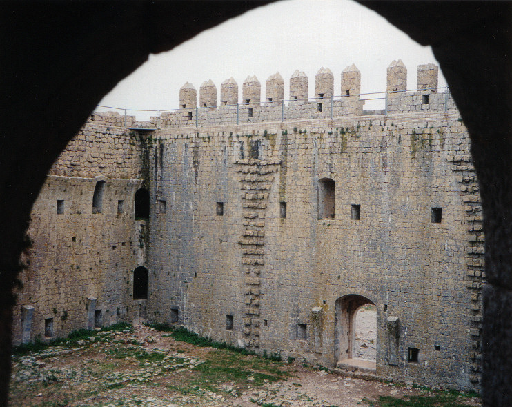 Montgri Massiv Cala Montgo